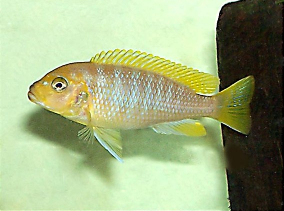 Maylandia hajomaylandi (Male)